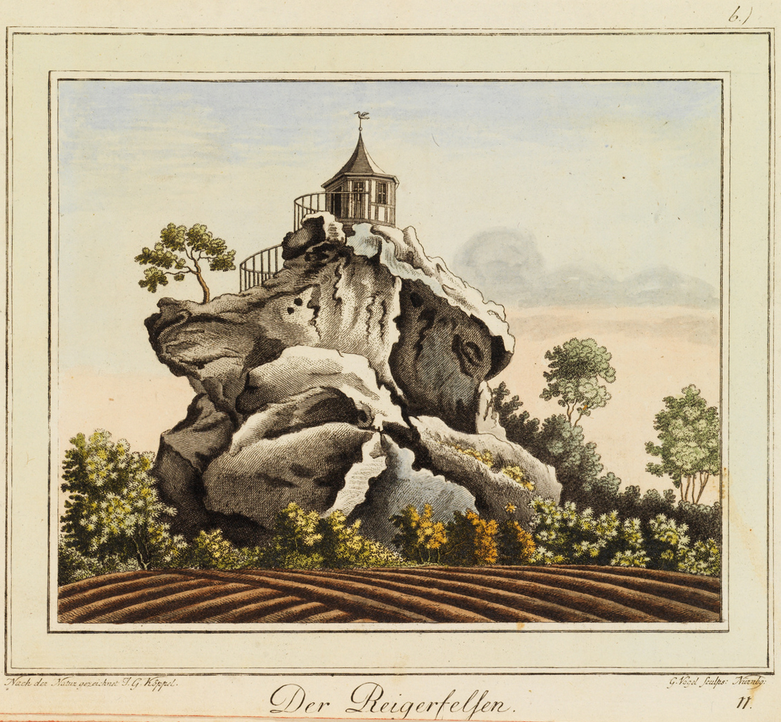 Von G. Vogel gestochene Zeichnung von Johann Gottfried Köppel aus dem Buch Die Eremitage zu Sanspareil. Nach der Natur gezeichnet und beschrieben von Johann Gottfried Köppel. Kais. Landgerichts-Registrator zu Anspach. Erlangen. Verlegt von Wolfgang Walther. 1793.